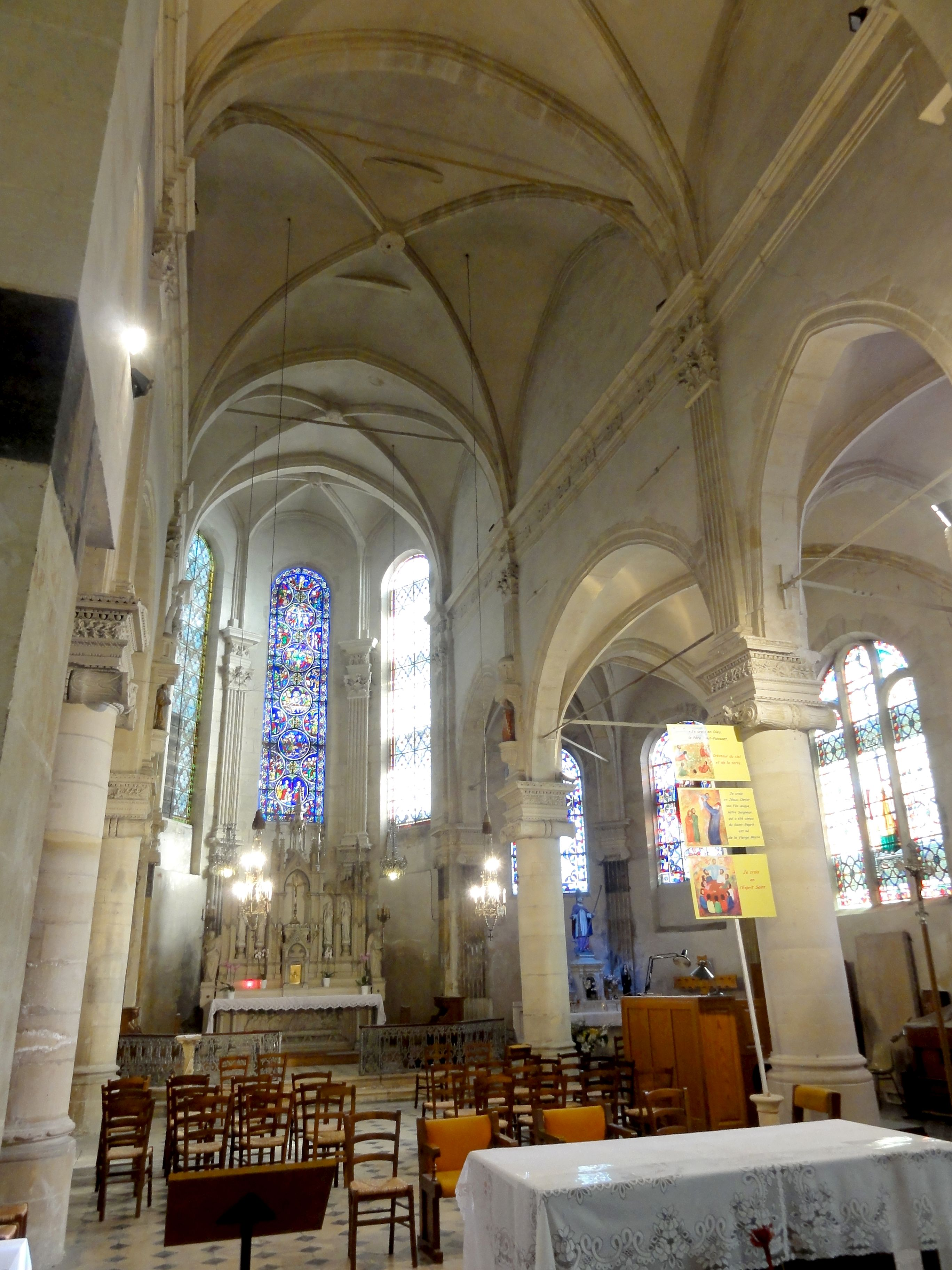 Chœur.